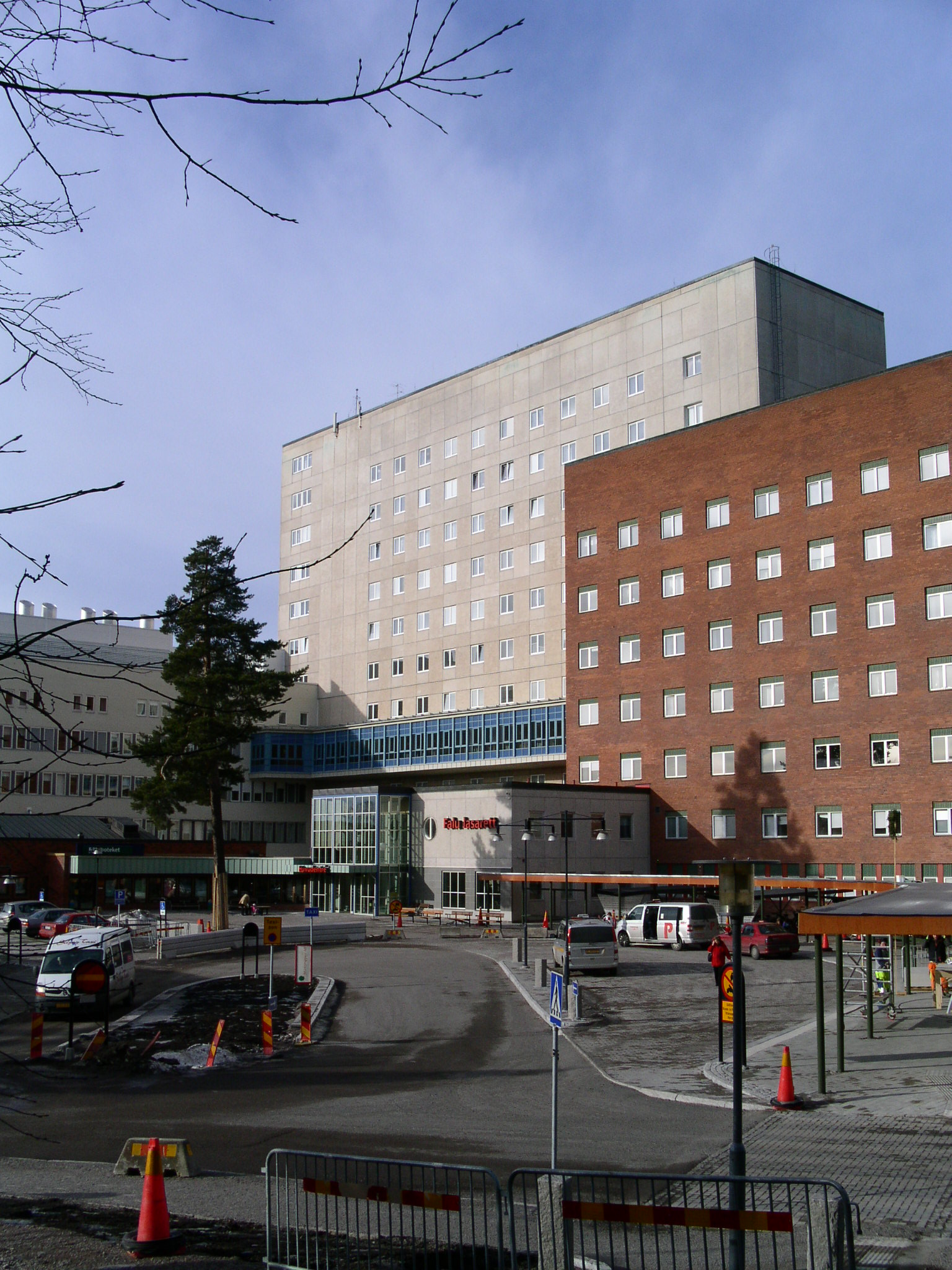 Falu Lassarett - Entrén.